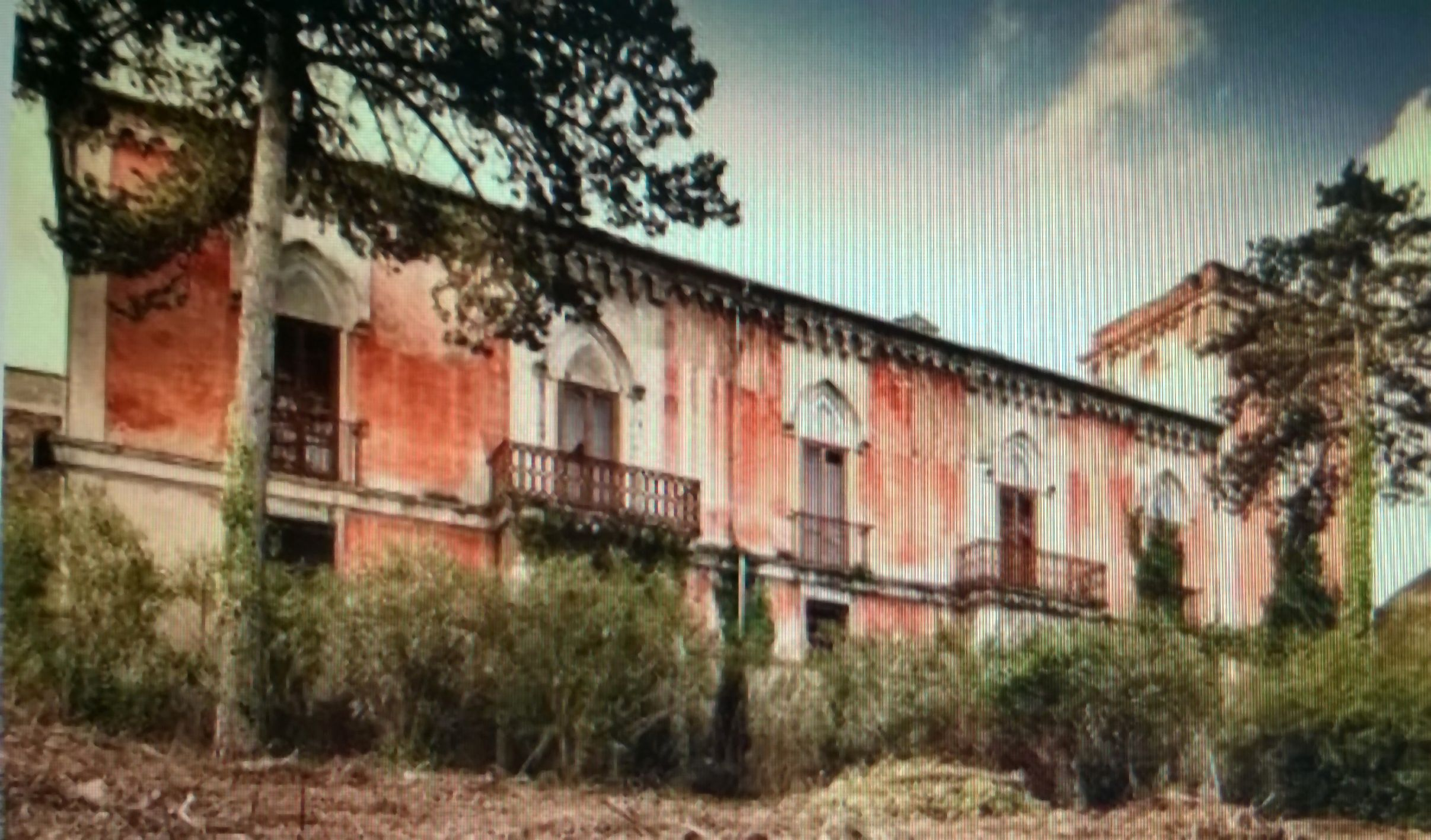 Palazzo di Giancola del Mercato di origina medioevale , con Torre ; a controllo della via dalla Piana alla Baronia del Cilento , parte del quadrilatero coi palazzi di altri 2 rami e della Chiesa della SS.Annunziata